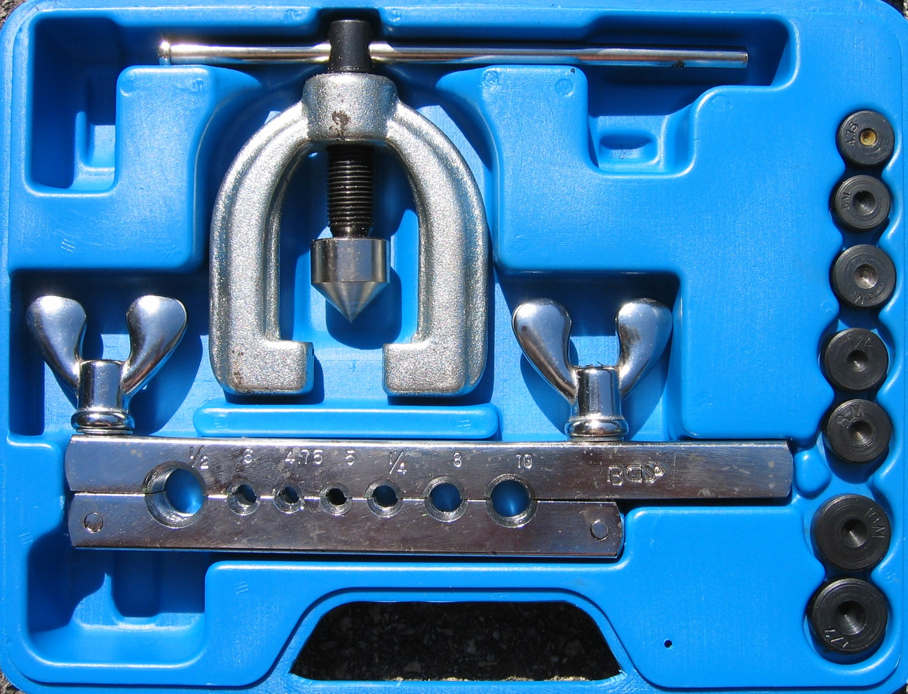 Bremsleitungsbördelgerät